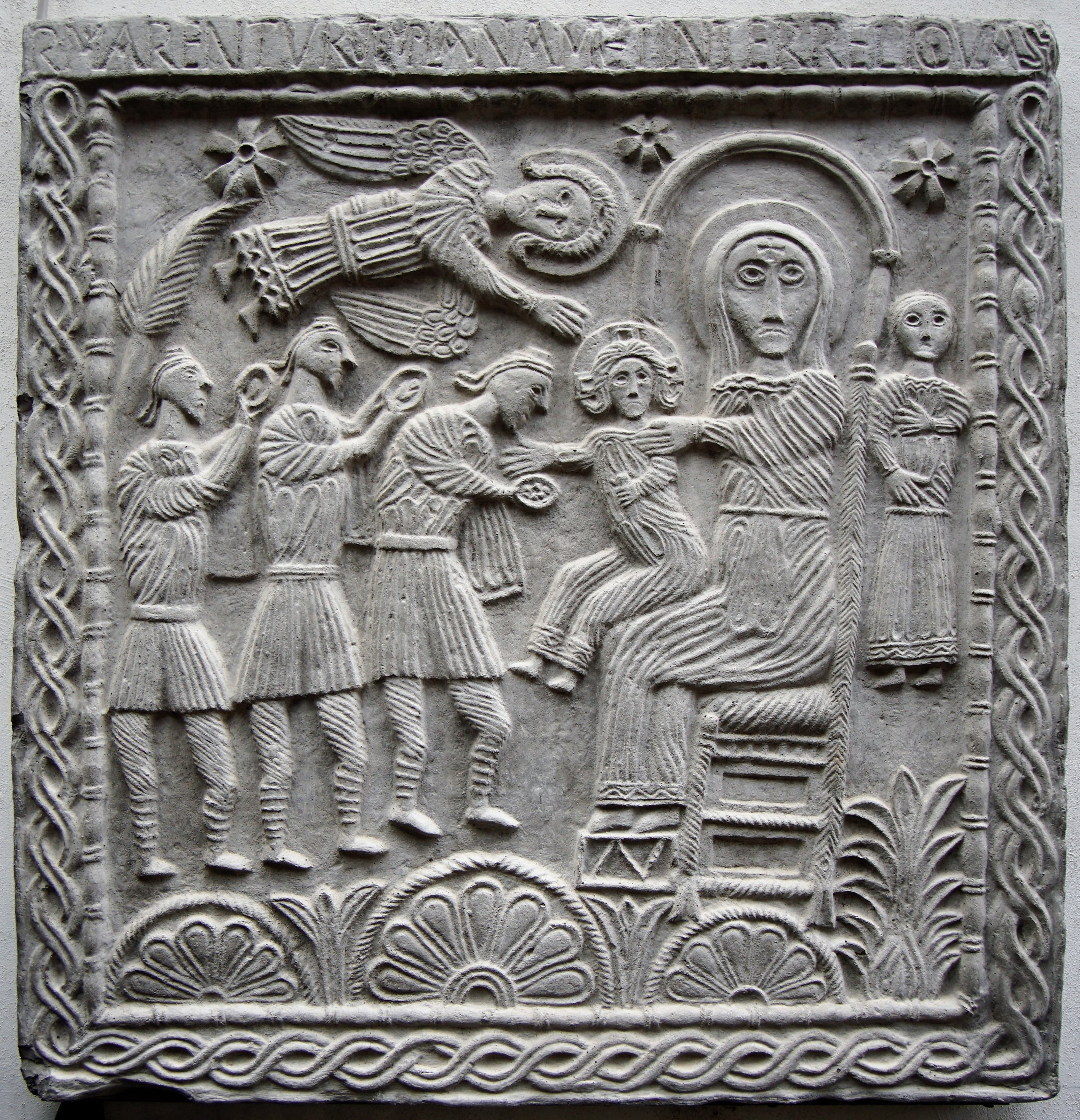 Cividale del Friuli, langobardisches Relief, Anbetung der Weisen